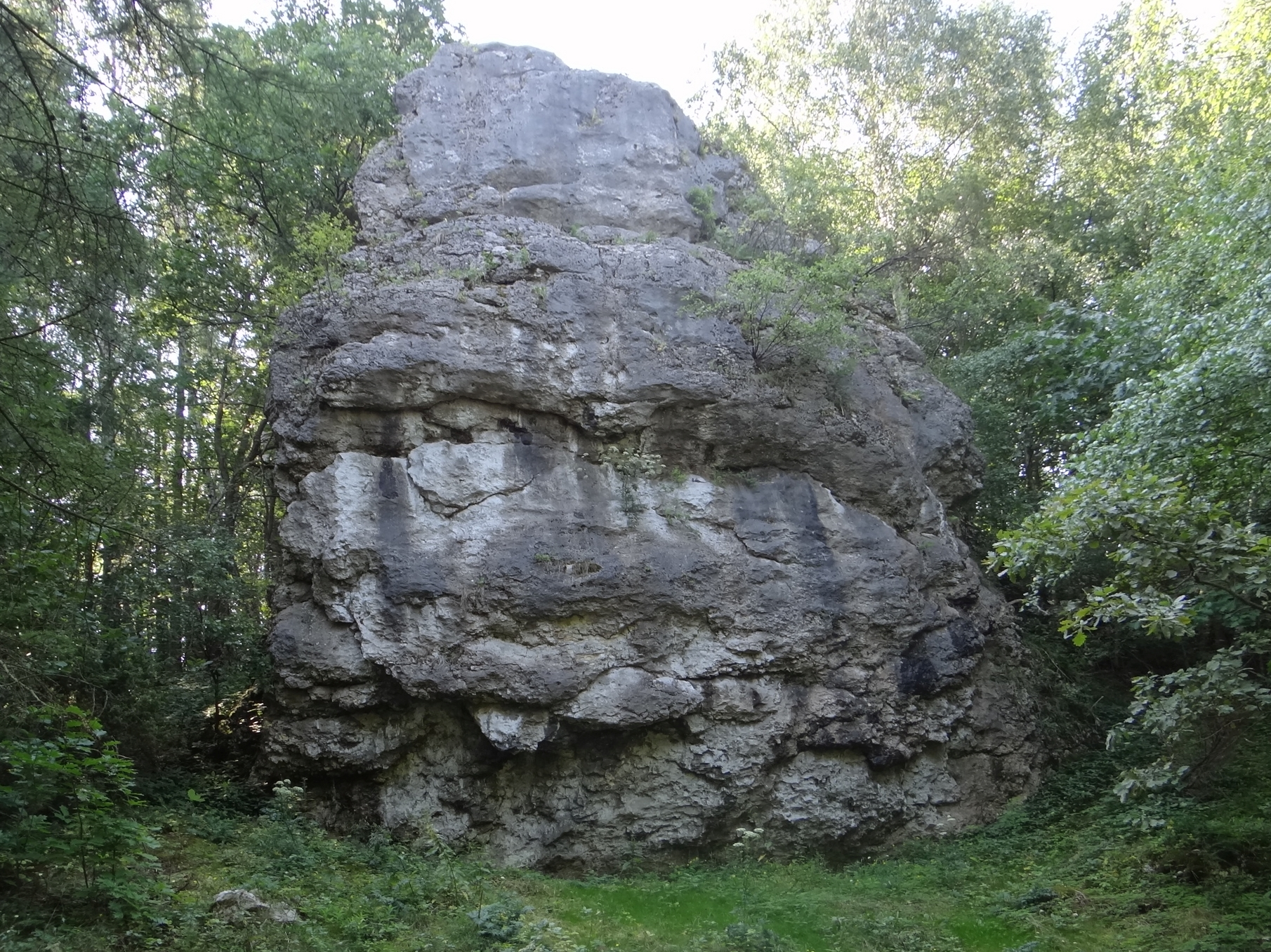 Ostaniec przy brzozie w Przewodziszowicach